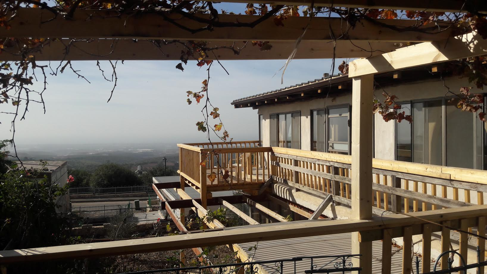 בית האדמה של האדריכל דויד רנוב , עין יעקב